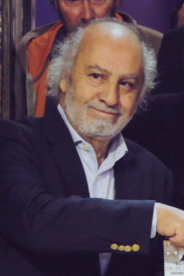 El director de cine chileno Miguel Littín durante el encuentro con directores y guionistas de cine agrupados en la Asociación Gremial de Guionistas de Chile celebrado por la presidenta Michelle Bachelet en noviembre de 2013.